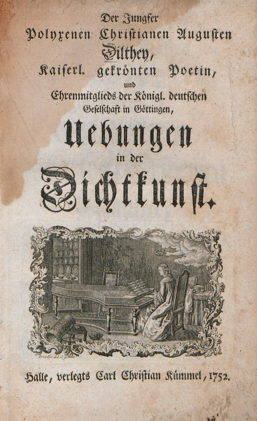 Der Jungfer Polyxenen Christianen Augusten Dilthey, Kaiserl. gekrönten Poetin, und Ehrenmitglieds der Königl. deutschen Geselschaft in Göttingen, Uebungen in der Dichtkunst, Titelblatt, Halle 1752